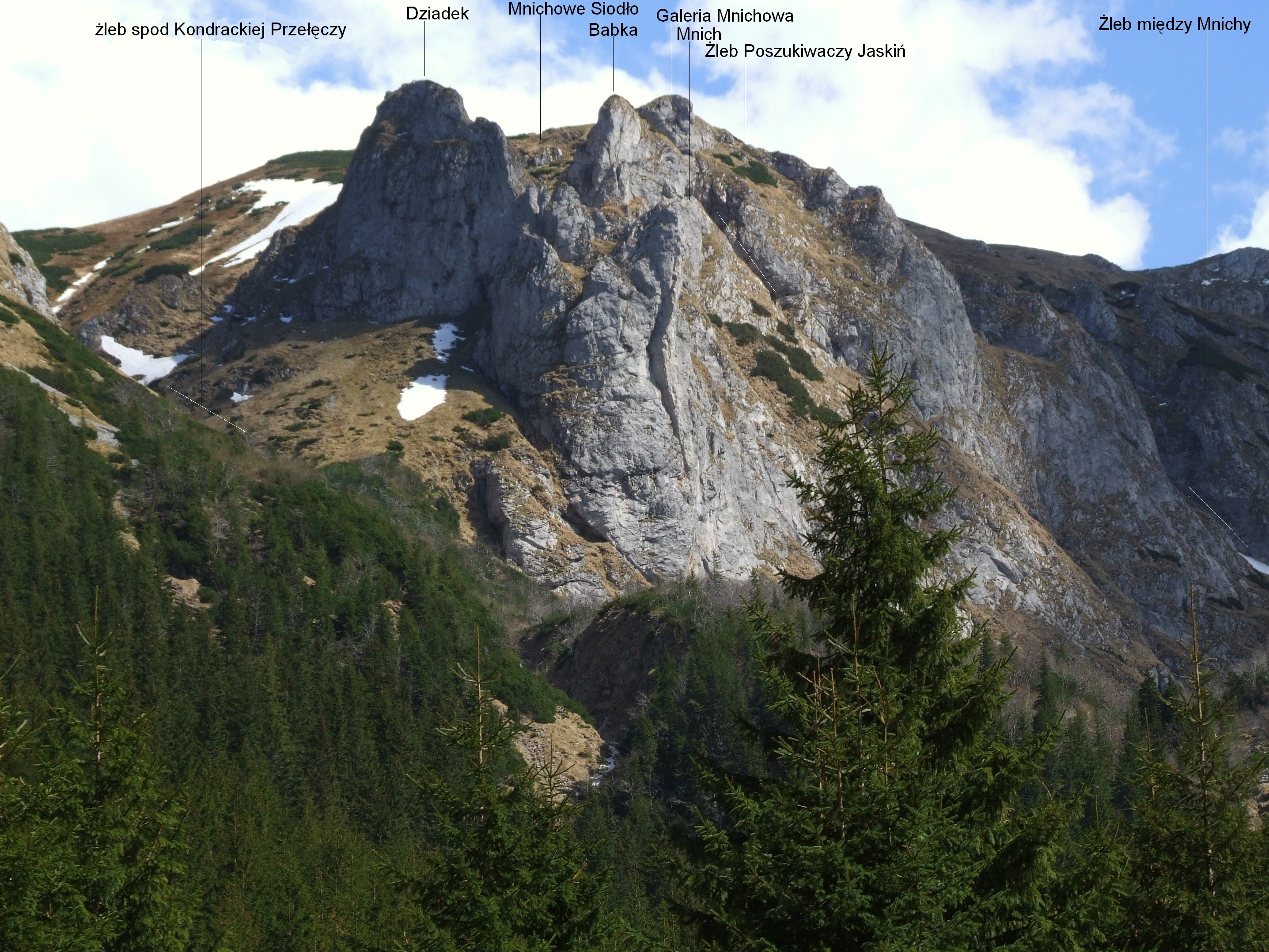 Widok z Wielkiej Polany Malołąckiej